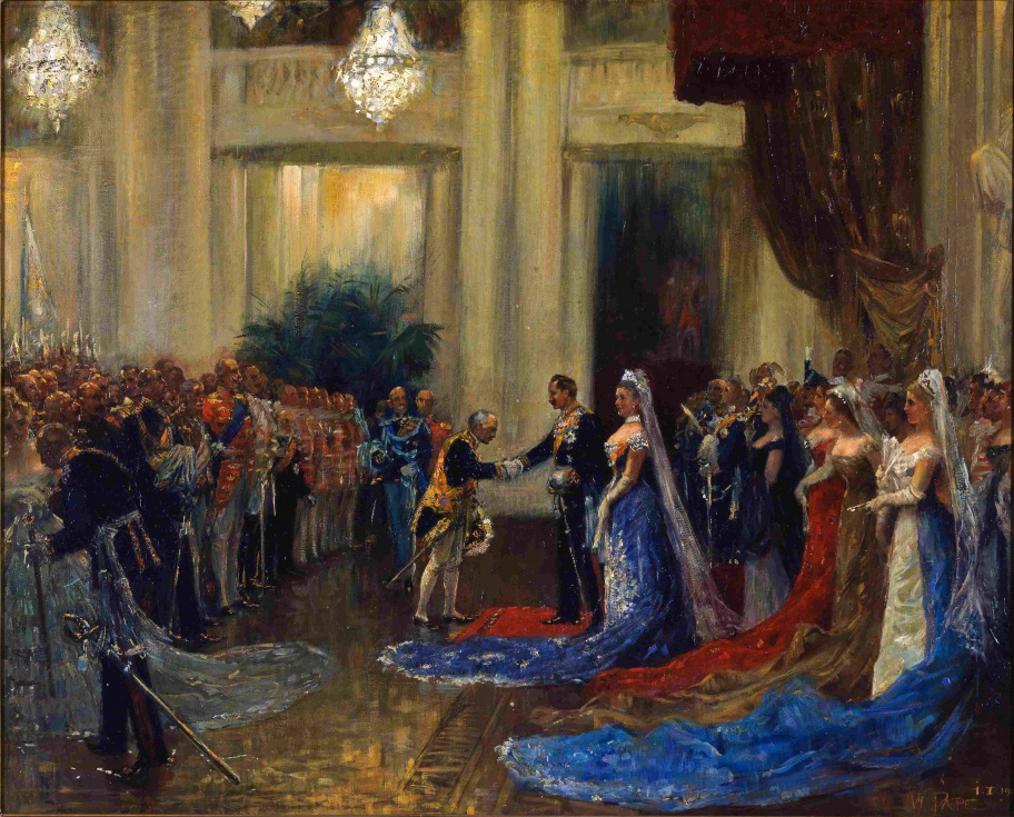 Neujahrsempfang Kaiser Wilhelm II. in der Knobelsdorff-Oper am 1. Januar 1901, Öl auf Leinwand, 104 x 123 cm Museum Abtei Liesborn des Kreises Warendorf